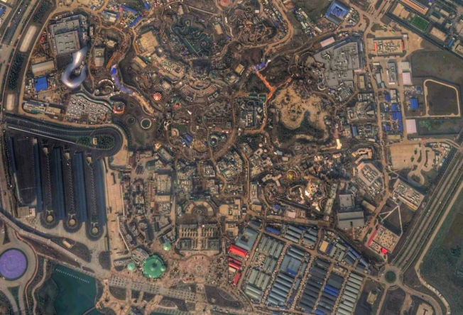 Shanghai Disneyland vista dal satellite, Gennaio 2016